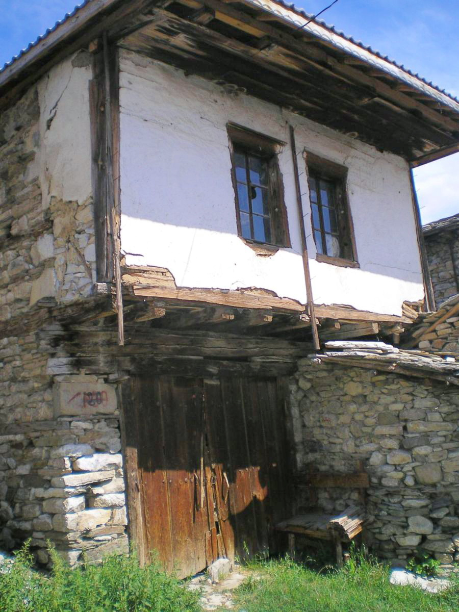 Възрожденска къща във Вълкосел.